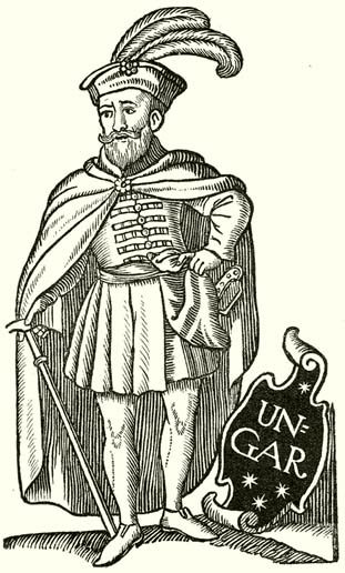 MÁRKI SÁNDOR DÓSA GYÖRGY 1470-1514 A MAGYAR TUDOMÁNYOS AKADÉMIA SEGÉLYEZÉSÉVEL KIADJA A MAGYAR TÖRTÉNELMI TÁRSULAT SZERKESZTI DR. DÉZSI LAJOS BUDAPEST AZ ATHENAEUM R.-T. KÖNYVNYOMDÁJA 1913